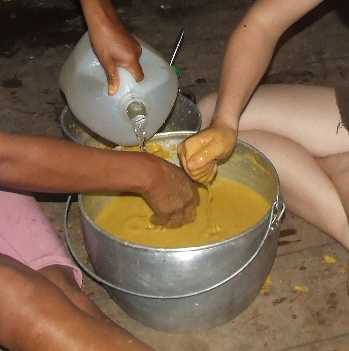 Herstellung von Chicha aus den Früchten der Chonta-Palme (Bactris gasipaes)